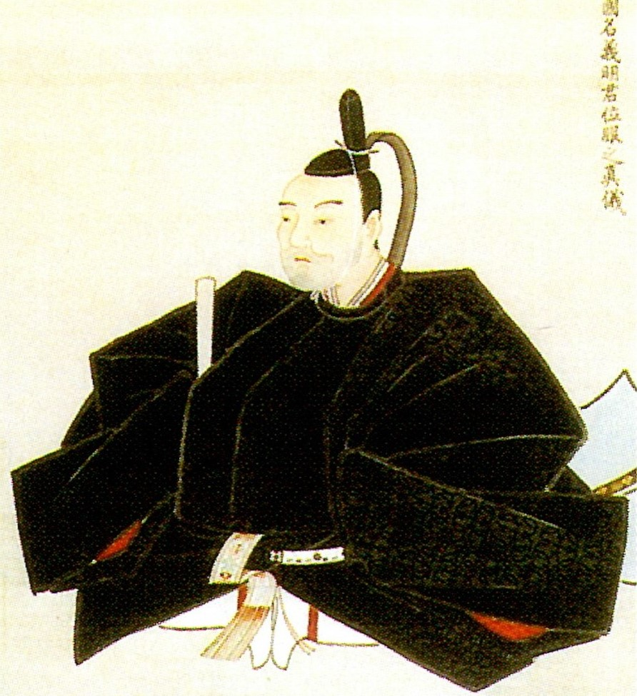 佐竹義明の肖像。